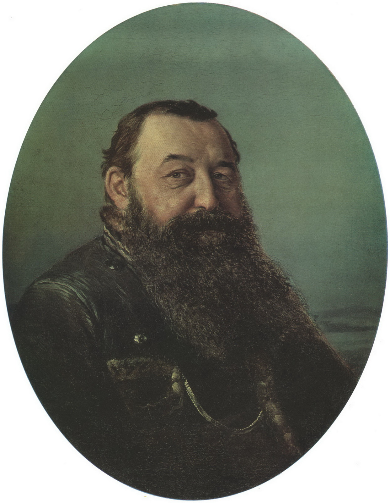 Портрет Н.Ф. Резанова